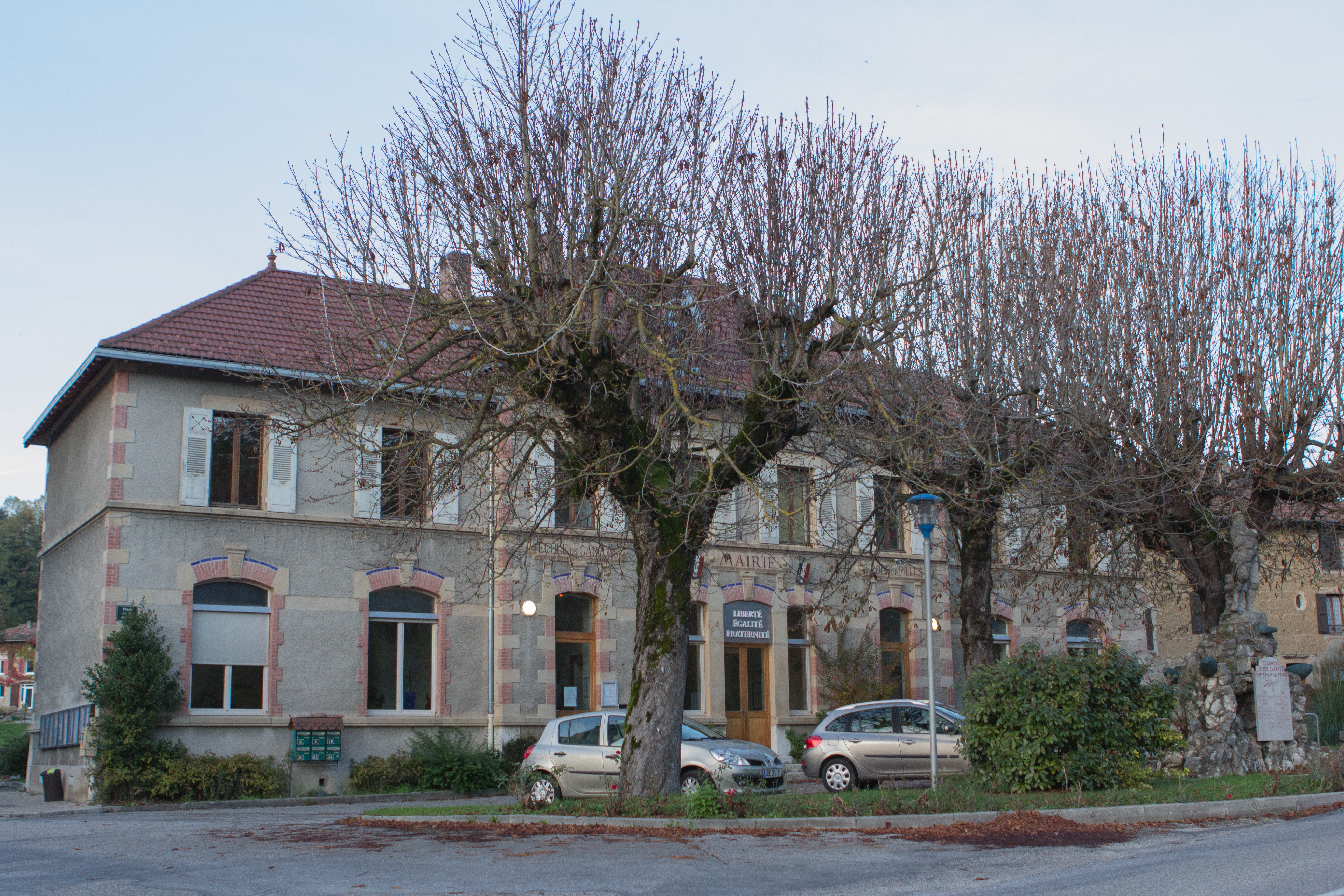 Mairie de Réaumont / Réaumont, Isère, France